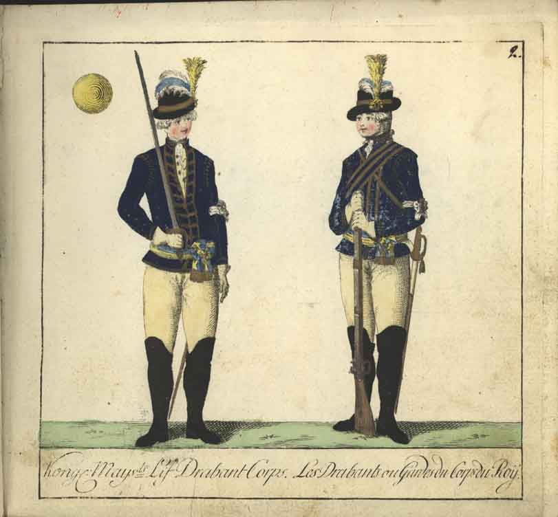 Livdrabanternas uniform m/1779, ur C. G. Roos samling.